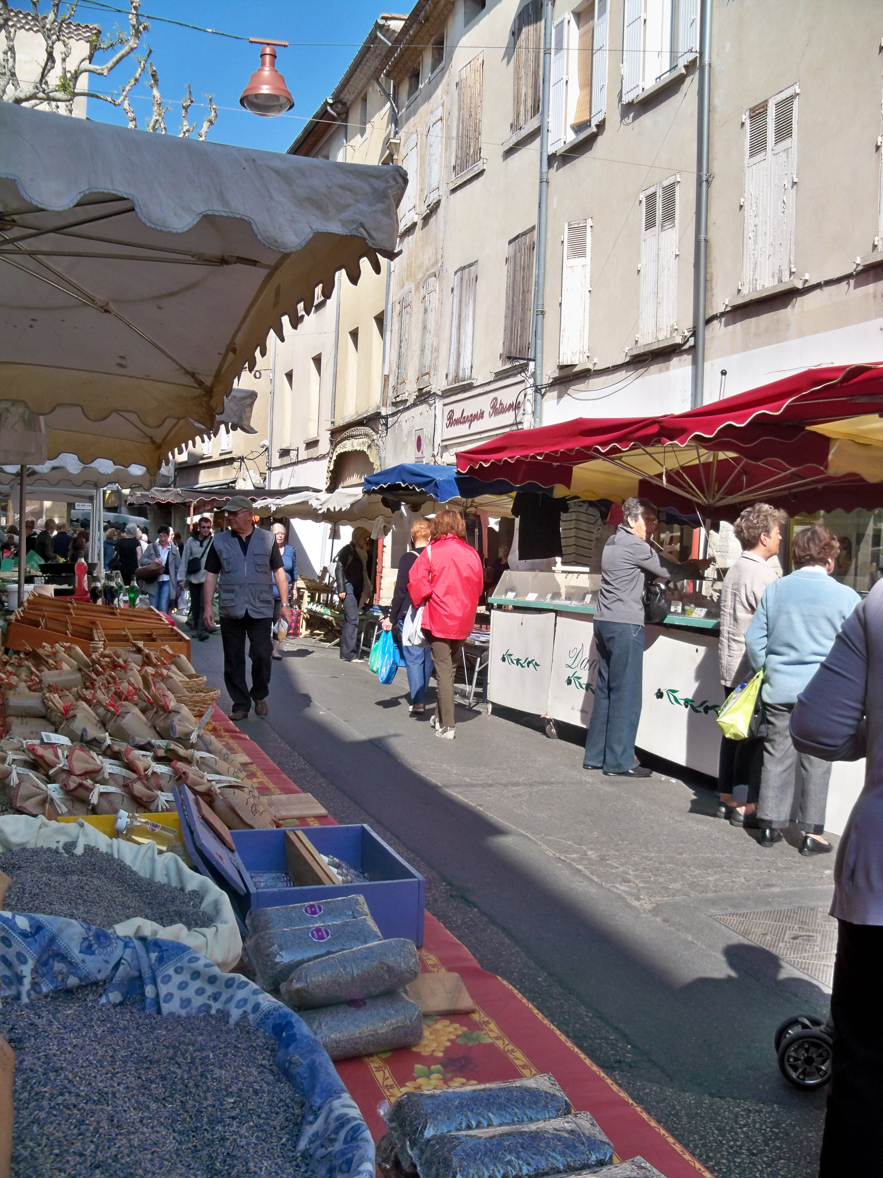 Marché hebdomadaire de Carpentras (84)